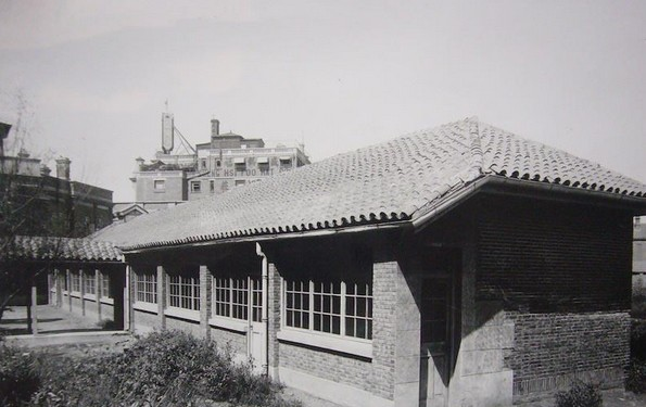 Laboratoire Pasteur